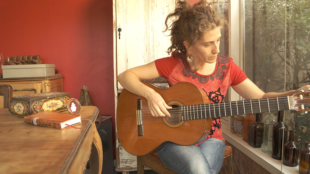 Magdalena y su guitarra